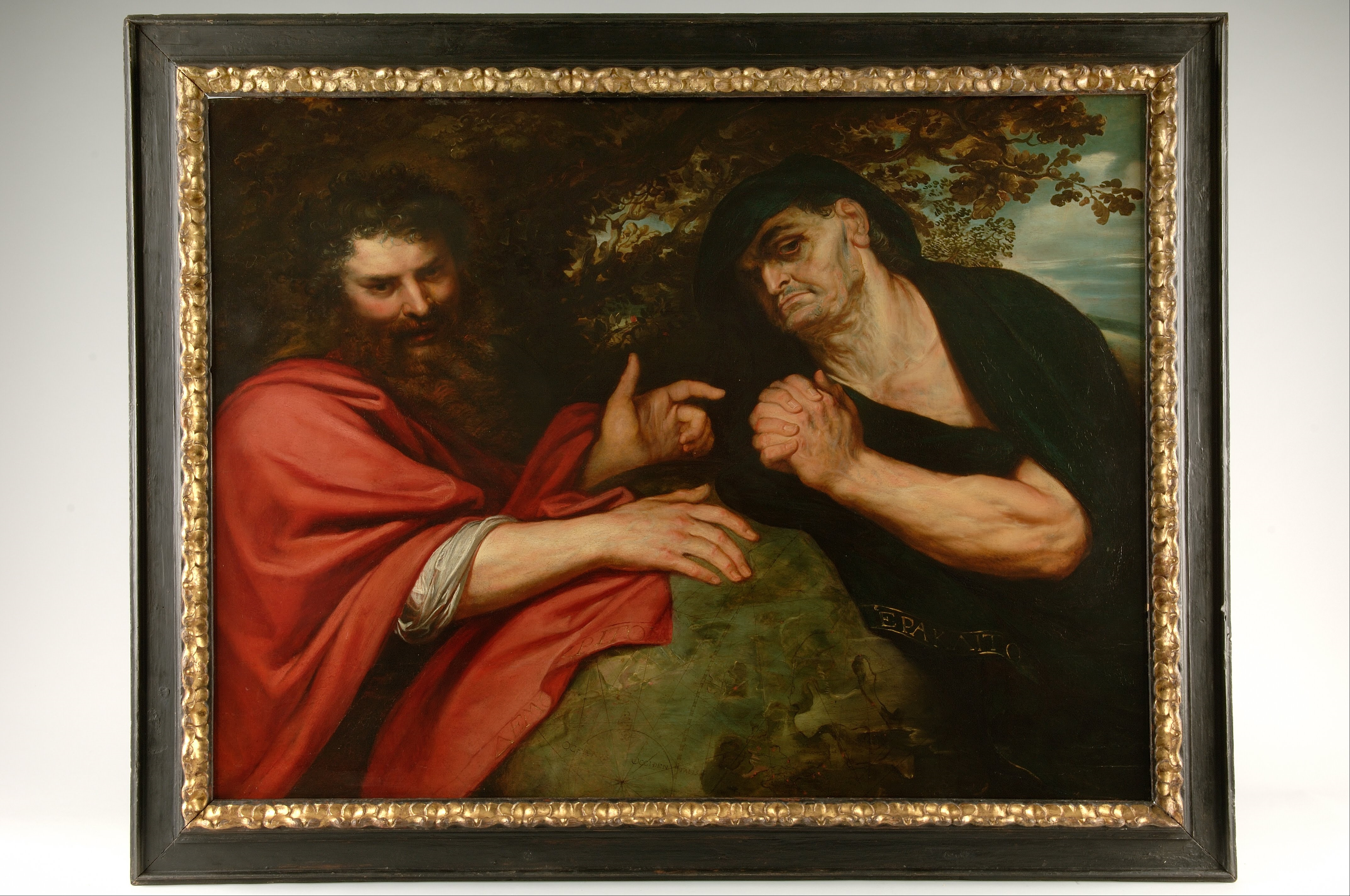 El lienzo representa a los sabios griegos Demócrito, filósofo presocrático y matemático, y a Heráclito, también filósofo.